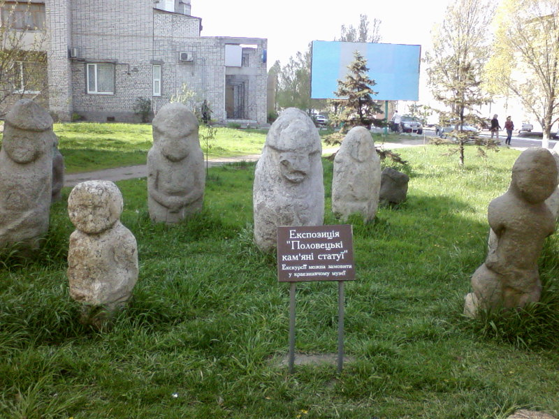 Кам'яні баби біля краєзначого музею